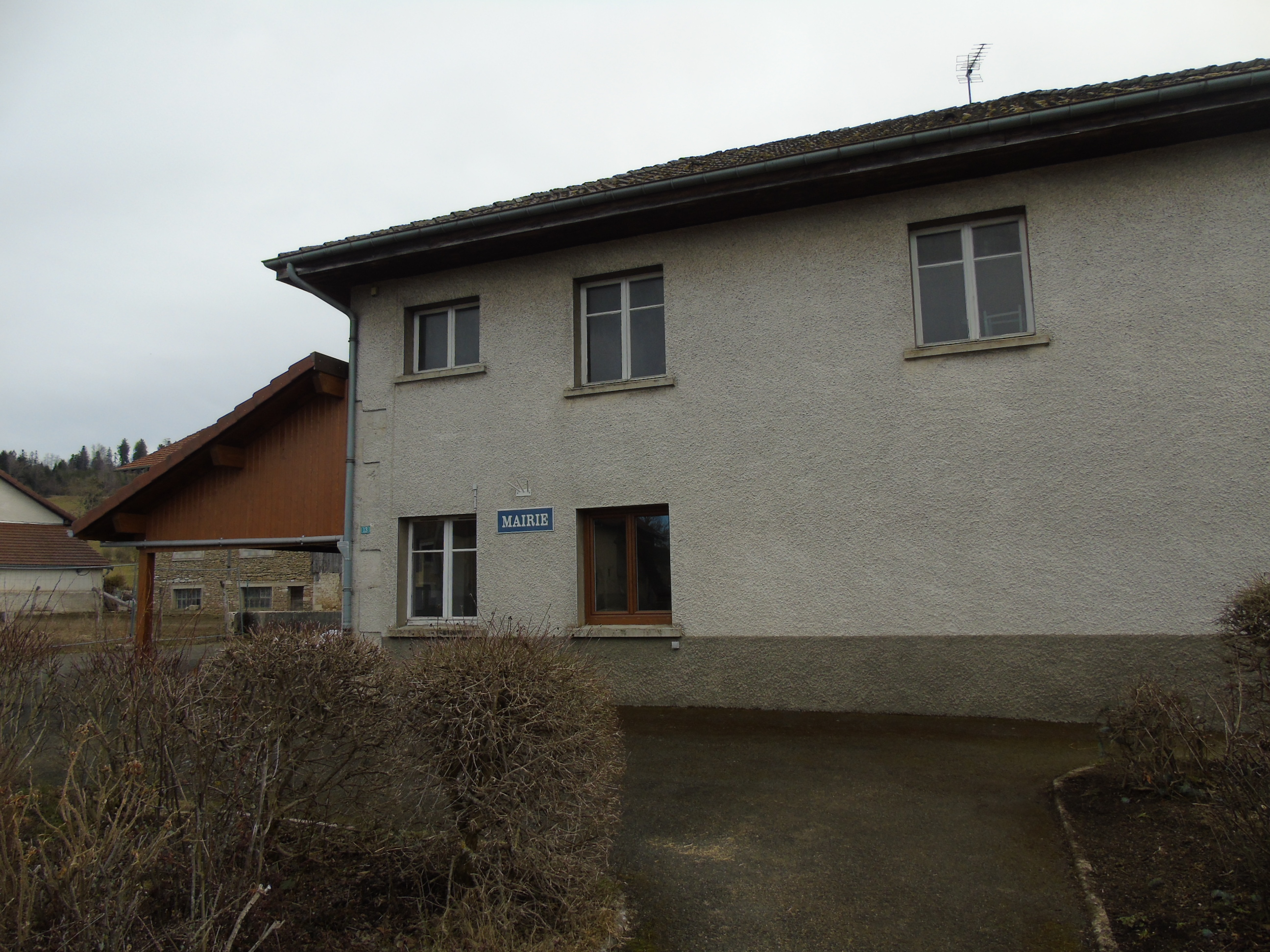 Mairie de Ferrières-le-Lac, Doubs, France